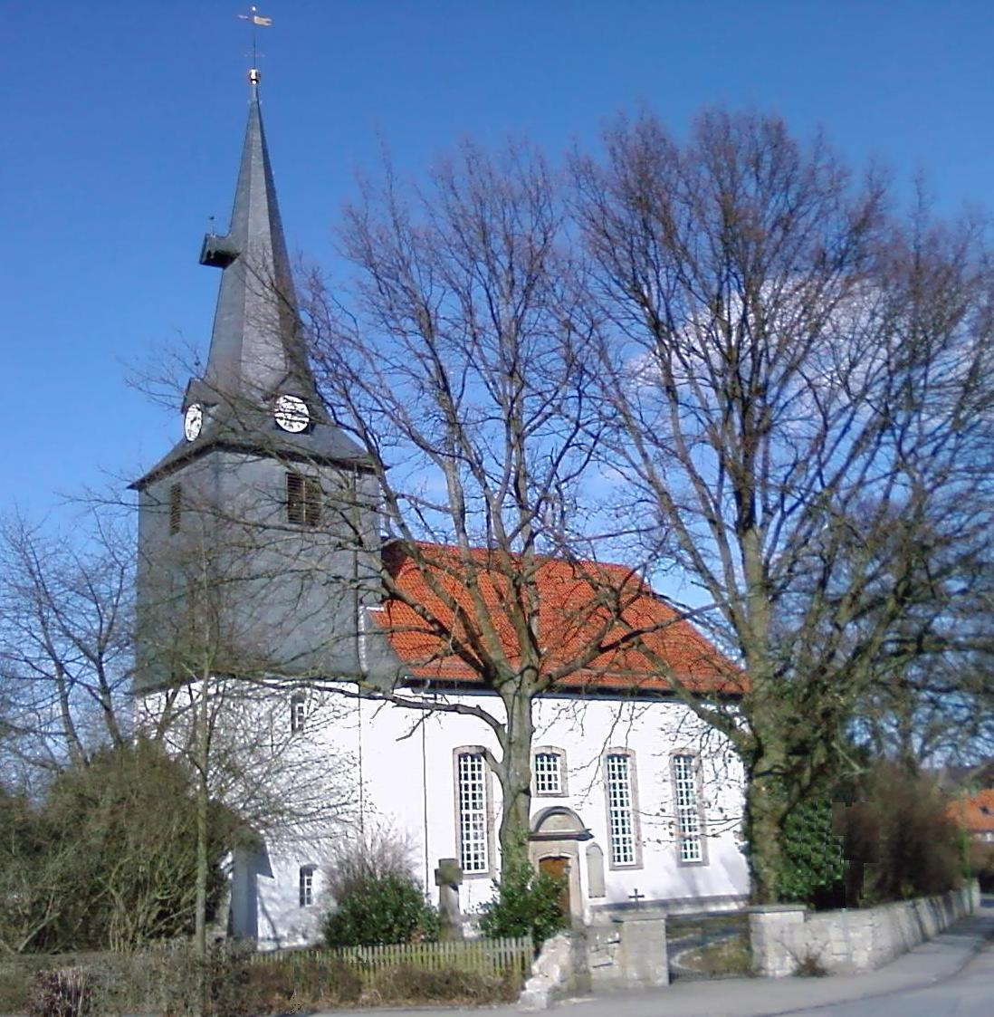 Die St. Nicolaikirche in Sibbesse